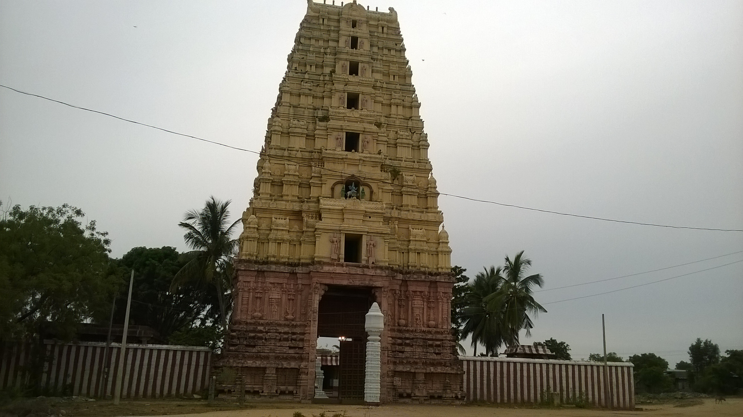 శ్రీవేణుగోపాలస్వామి దేవాలయం, జటప్రోలు